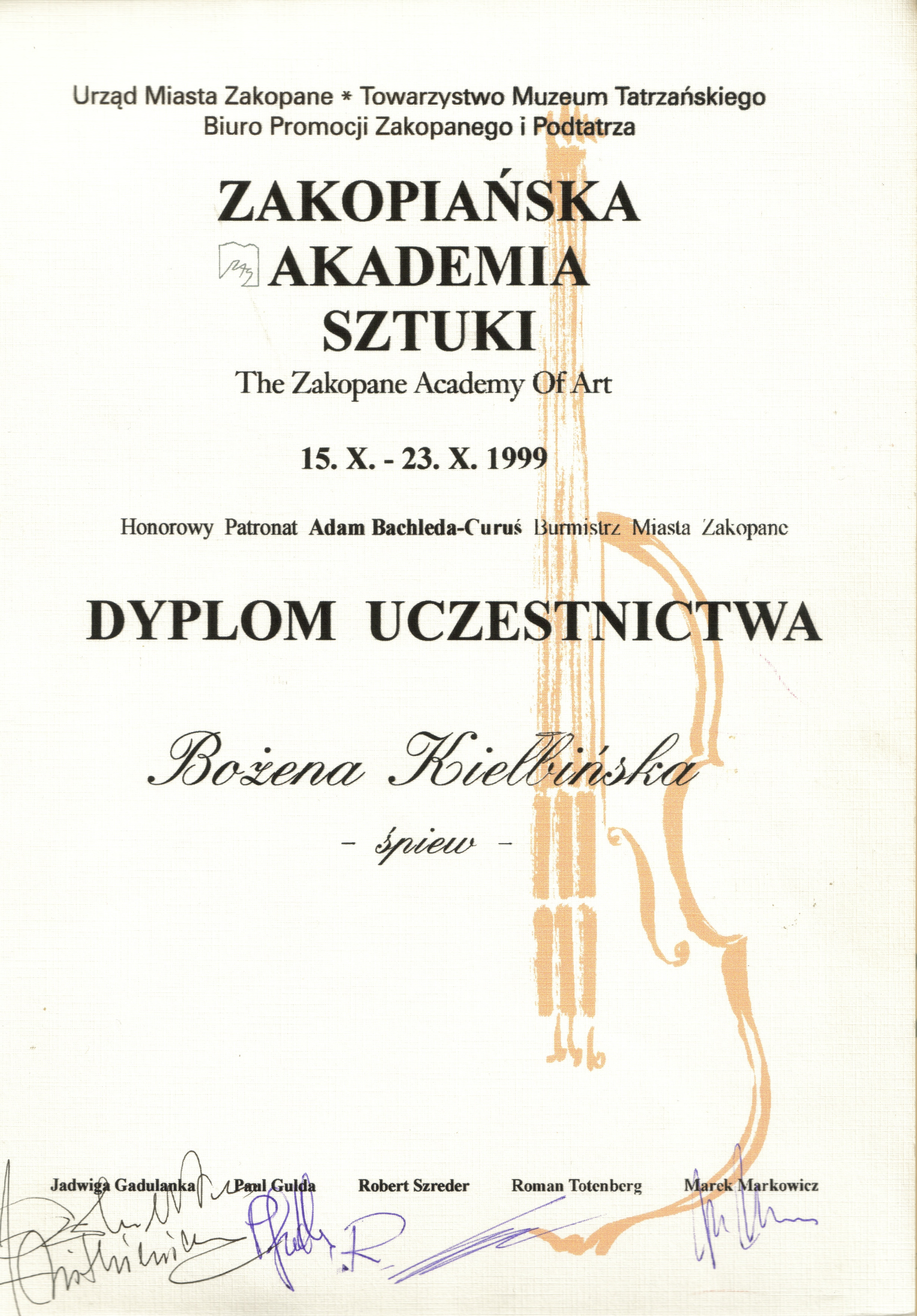 Bożena Kiełbińska_Dyplom_Zakopiańska Akademia Sztuki